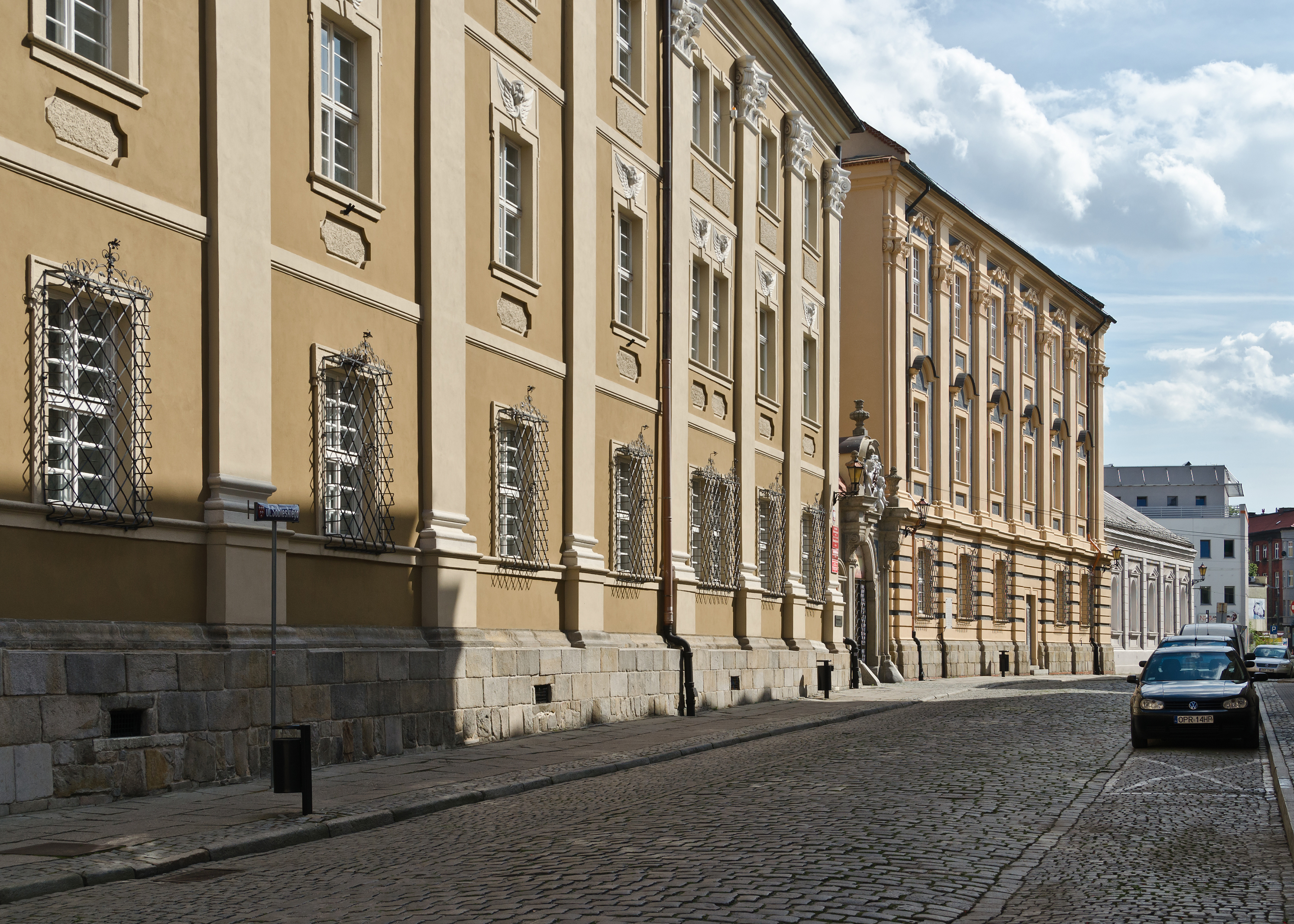 Nysa, kolegium Carolinum, ob. LO im. Jana III Sobieskiego, 1669-1673